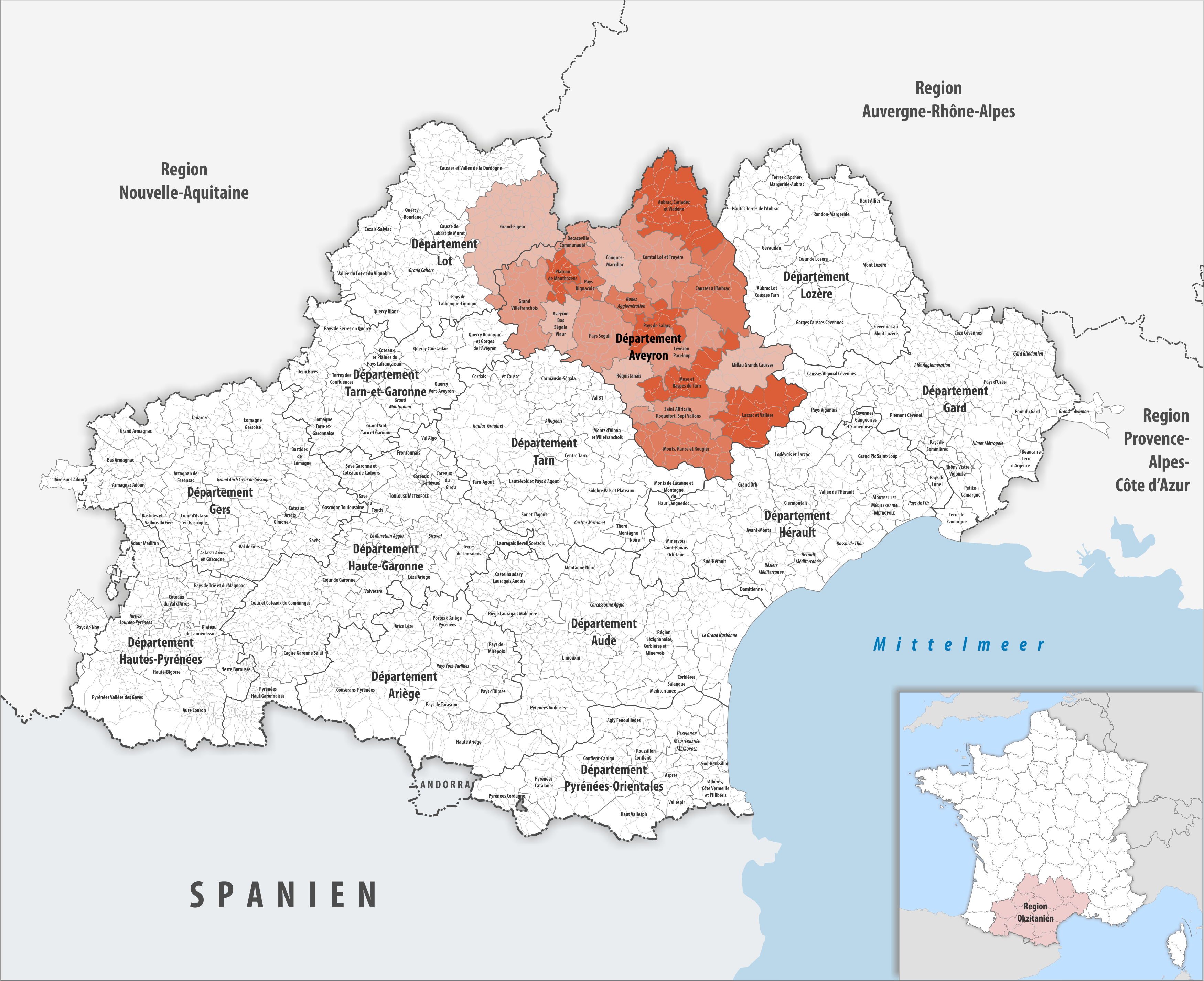 Gemeindeverbände im Département Aveyron